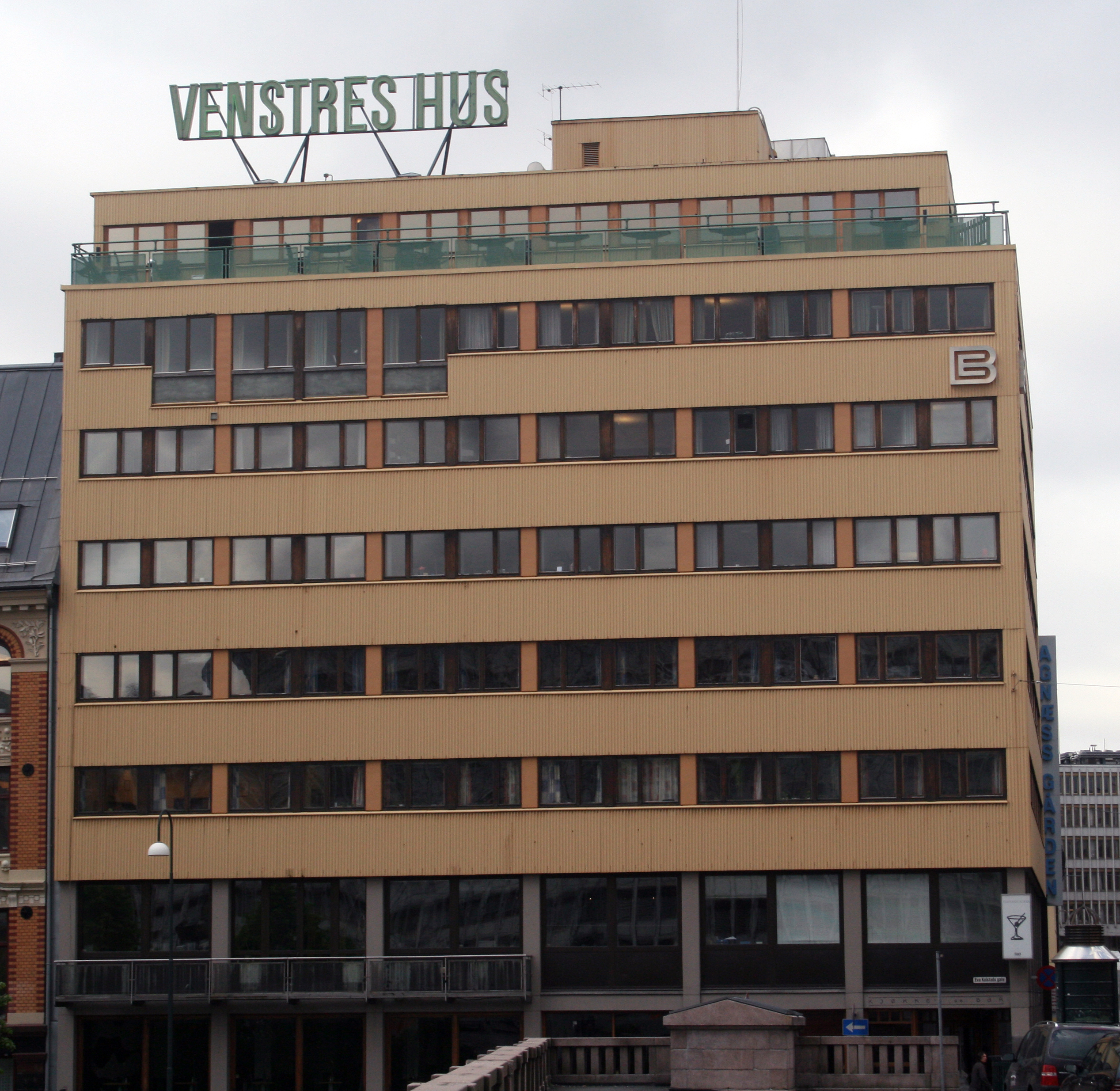 Venstres Hus i Møllergata 16 i Oslo; arkitekt Knut Knutsen (1954)